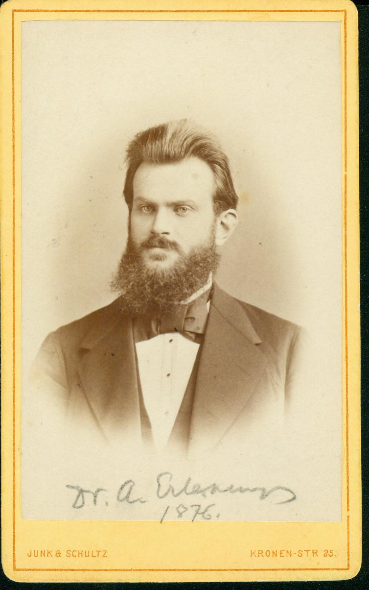 Geheimer Sanitätsrat Dr. med. Friedrich Albrecht Erlenmeyer II als Mitglied der Landsmannschaft Teutonia im Jahr 1876.